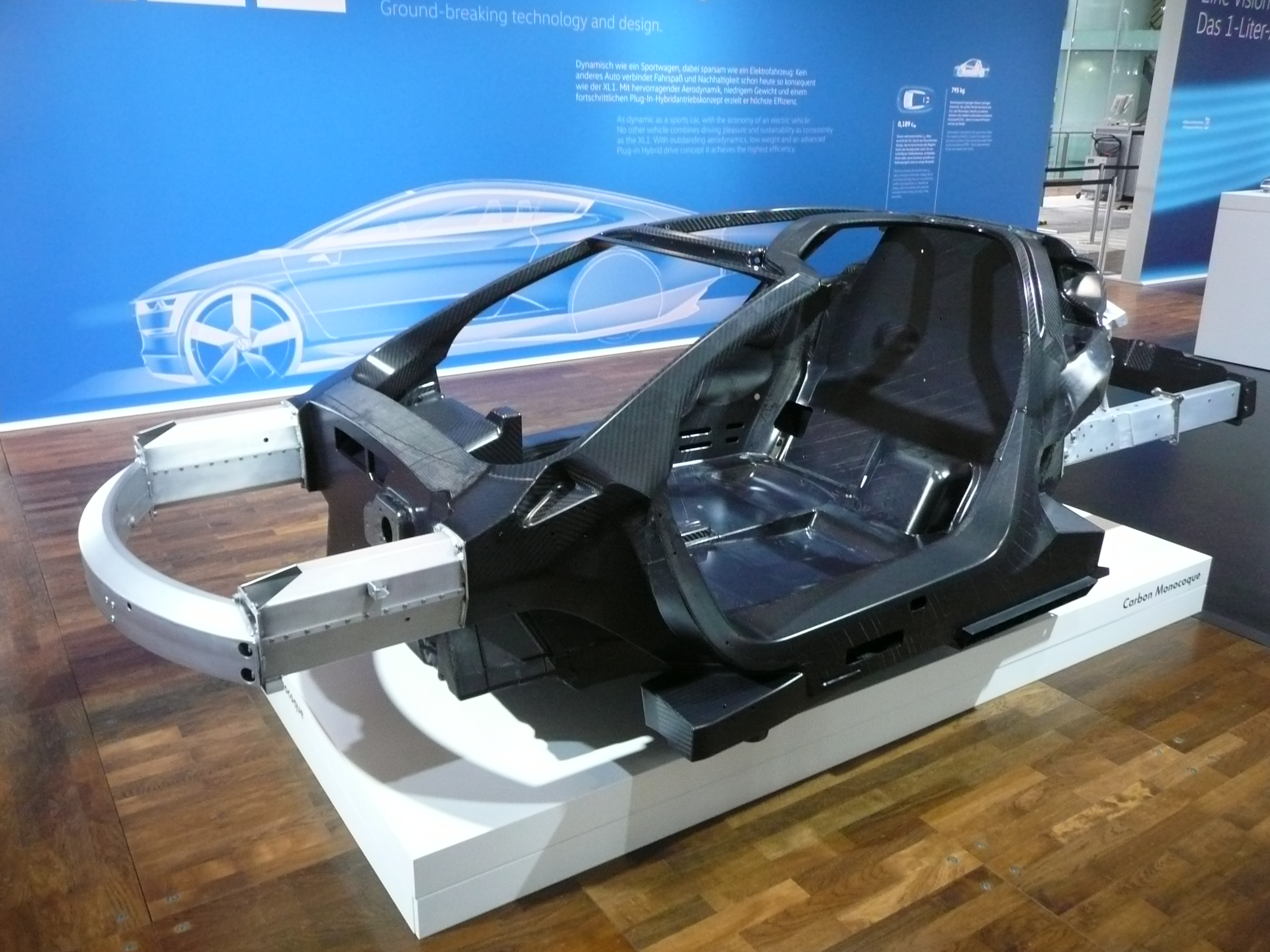 Karosserie des Volkswagen XL1, ausgestellt in der Gläsernen Manufaktur